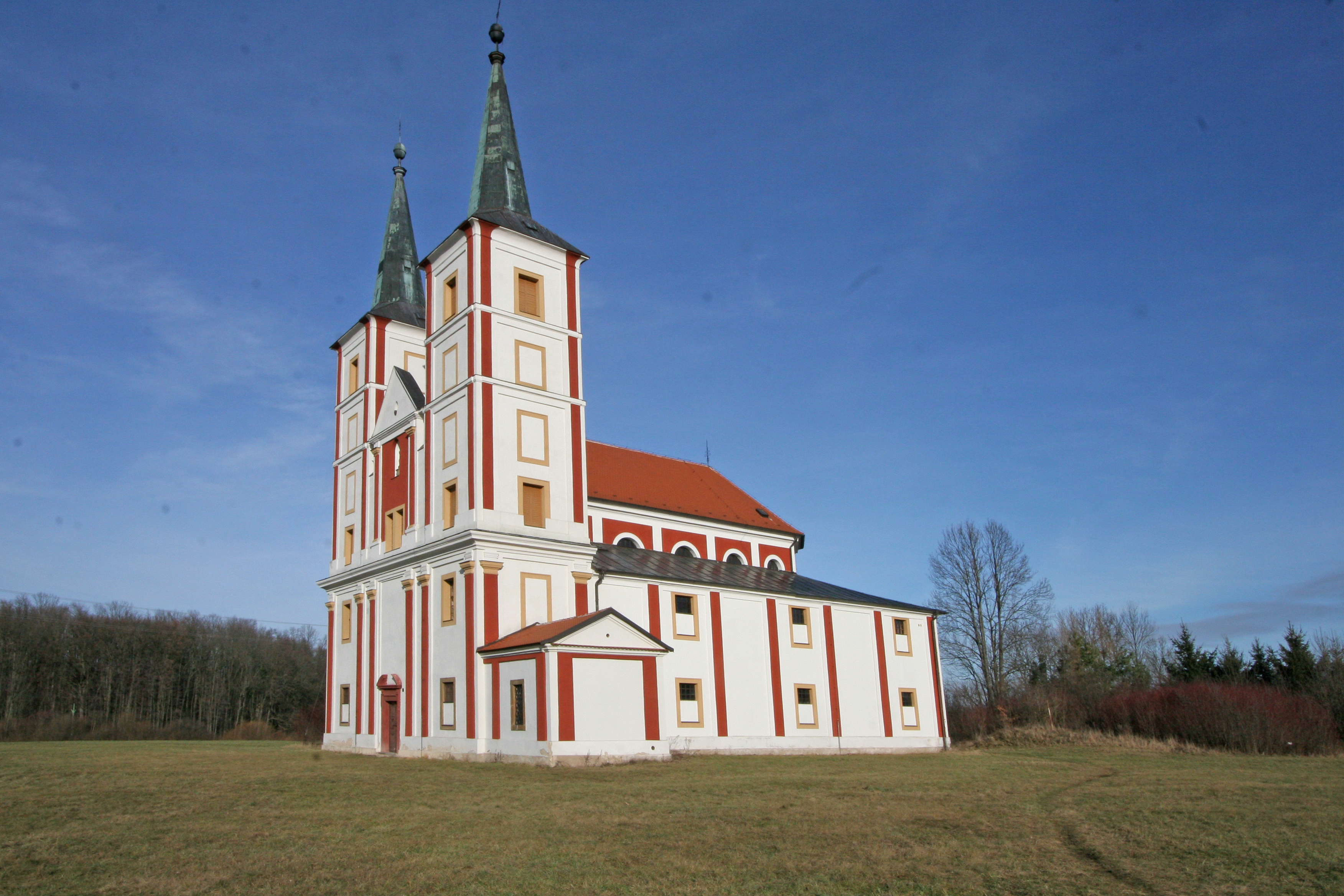 Kostel sv. Markéty (Podlažice), Podlažice